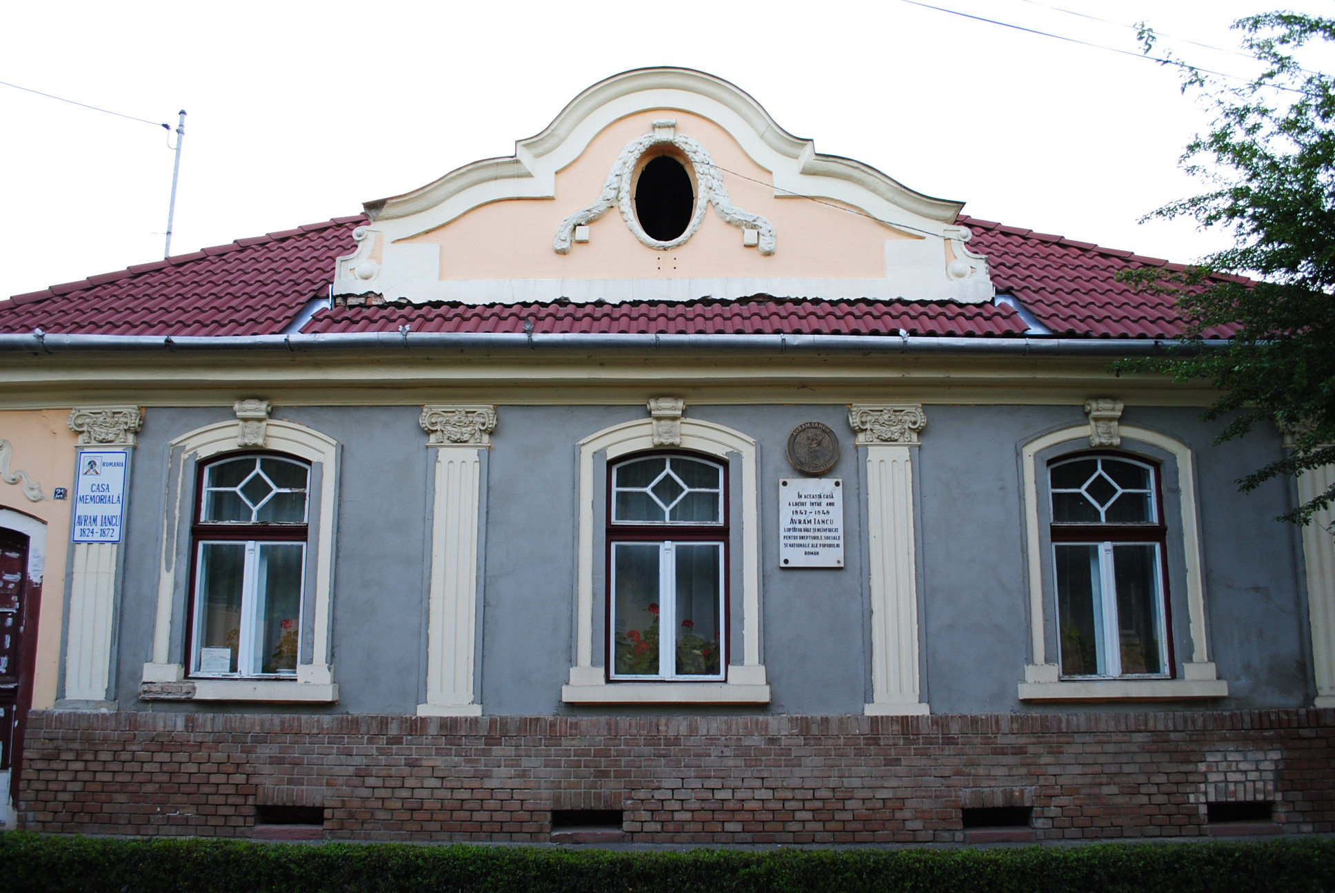 Casa "Avram Iancu", sec. XVIII